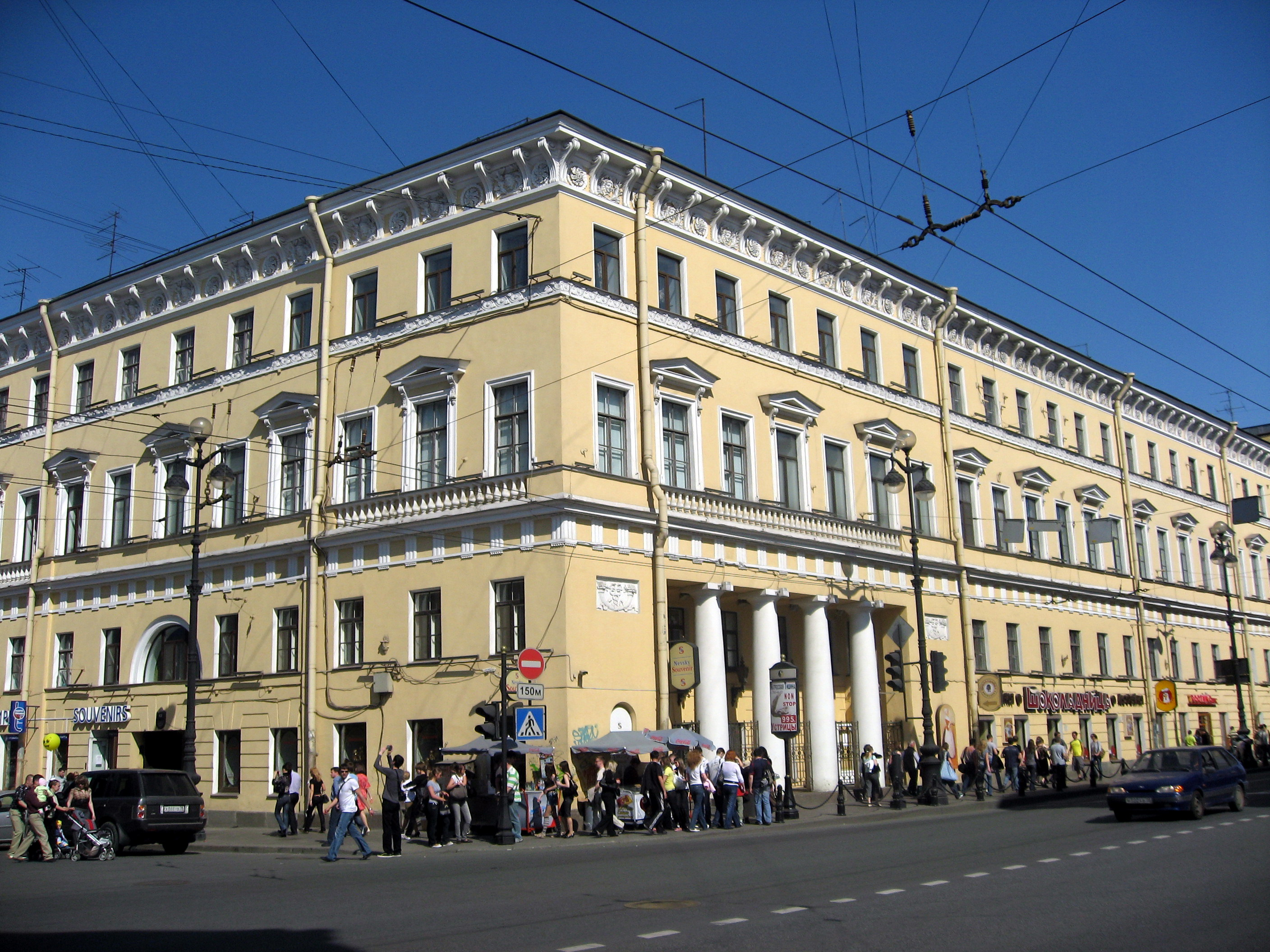 Sankt-Petěrburg